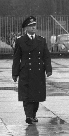 Übelhack, Befehlshaber Territoriale Verteidigung (2. v.l.), verabschiedet sich vom Wehrbereichskommando I in den Ruhestand. Links der Befehlshaber im Wehrbereich, Konteradmiral Helmut Neuss.